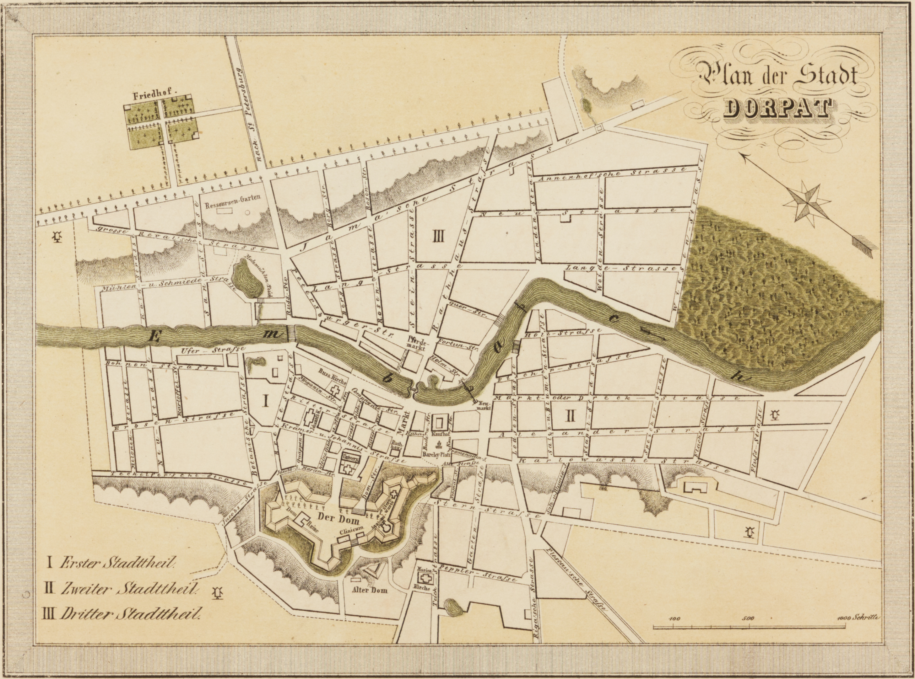 Tartu album. Tartu linnaplaan. MUIS: TKM TR 4038 H 31:3